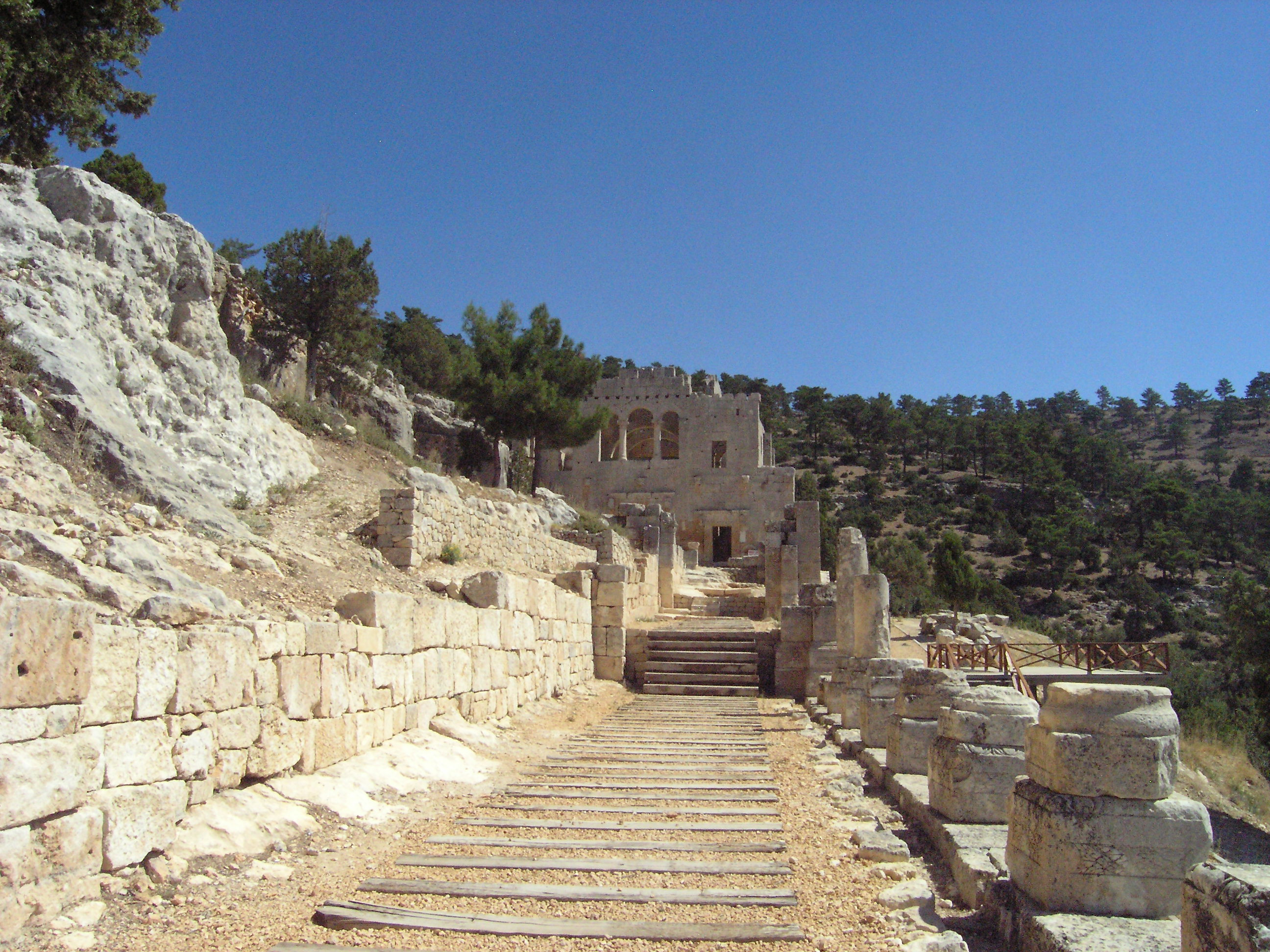 Alahan "Kloster", frühbyzantinische Pilgeranlage in der Türkei (Provinz Mersin), Weg zur Ostkirche